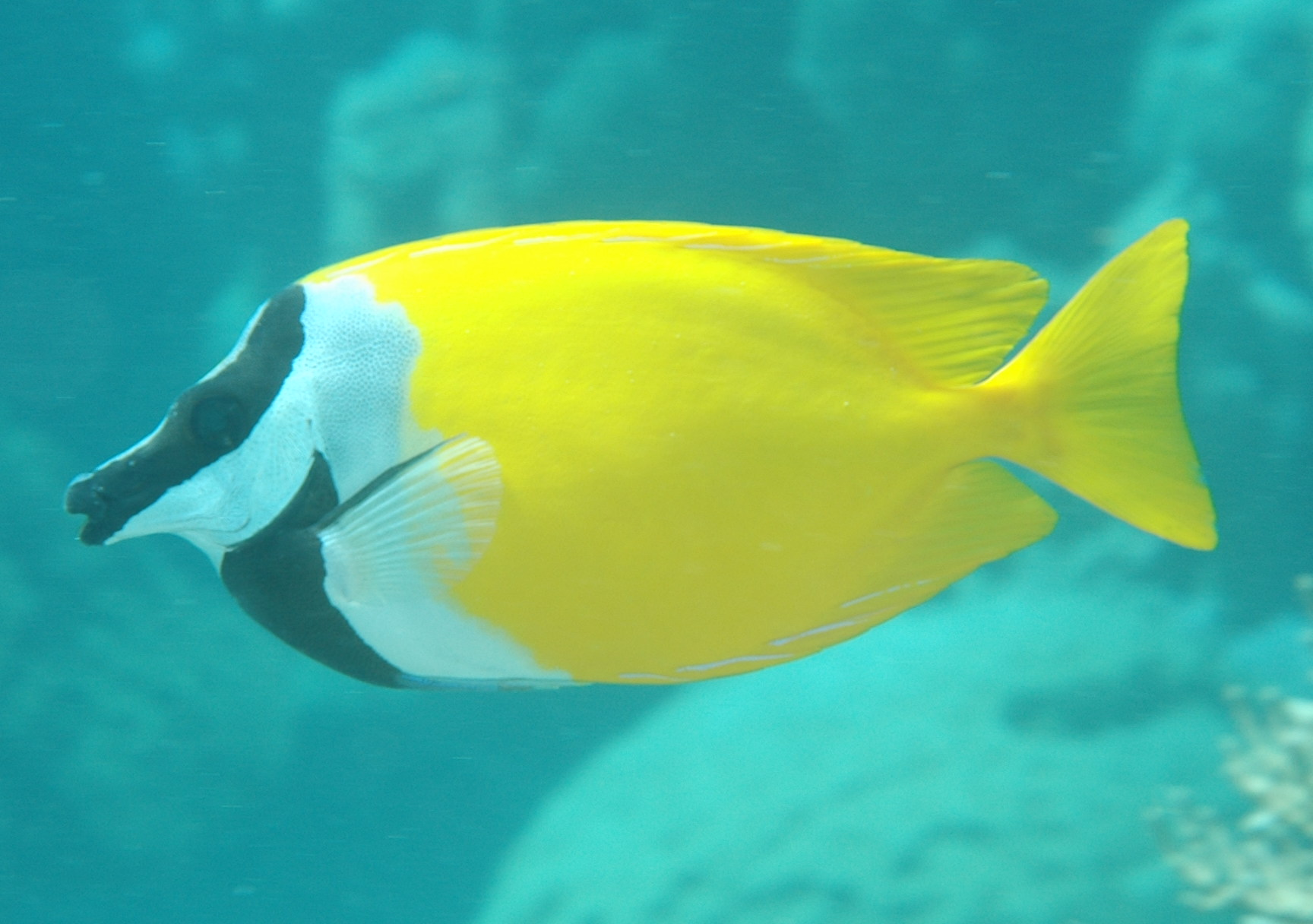 Siganus vulpinus